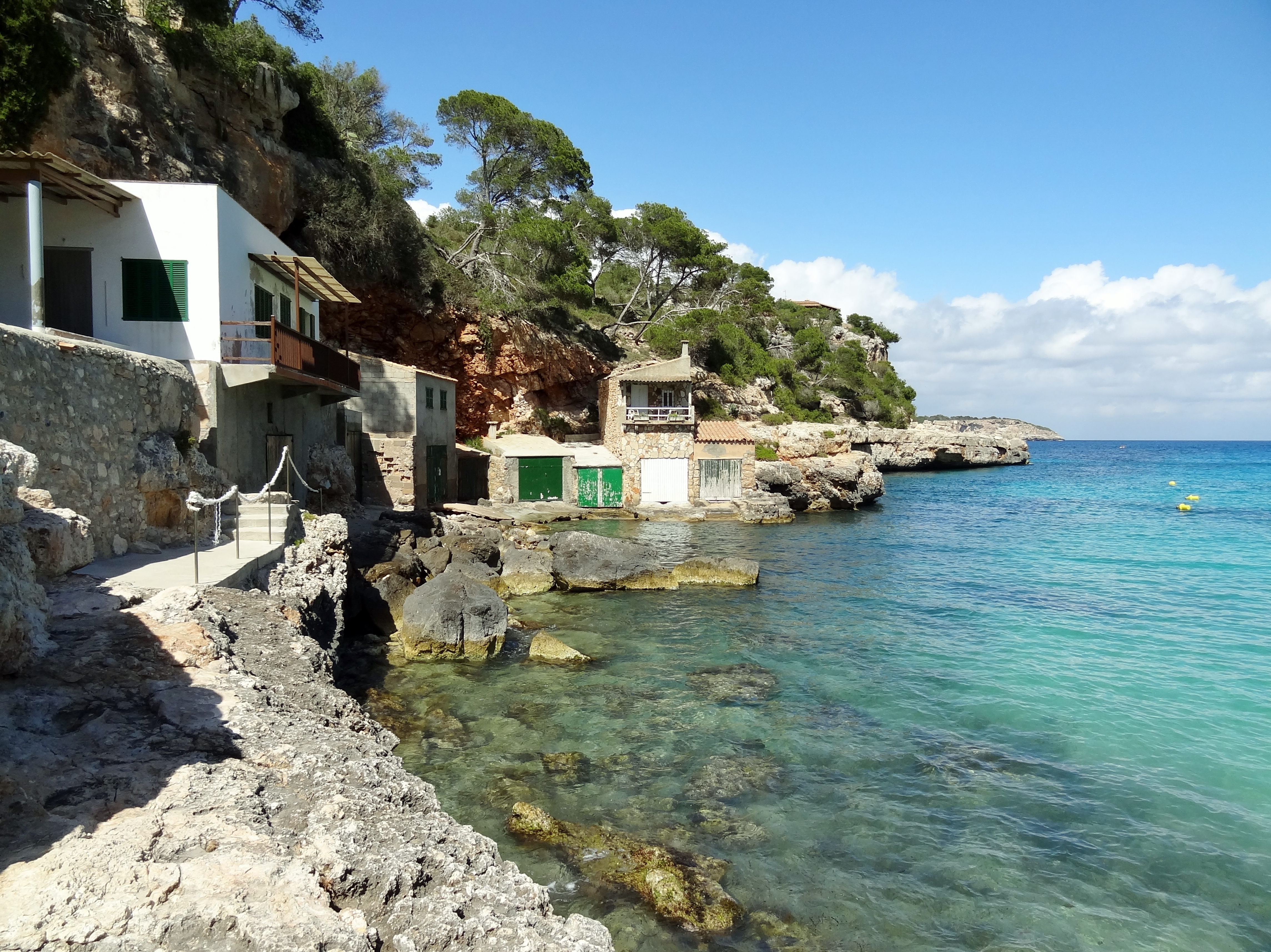 Cala Llombards, Gemeinde Santanyí, Mallorca, Spanien